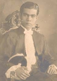 Josué de Castro com 21 anos em sua formatura, no ano de 1929.